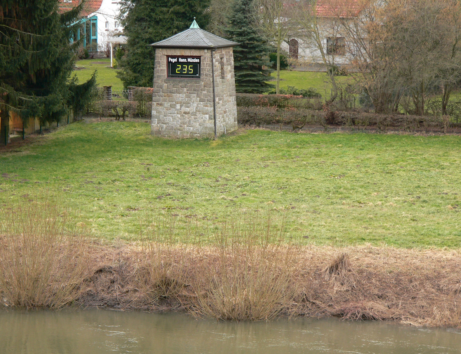 Weserpegel Hann. Münden an der Weser